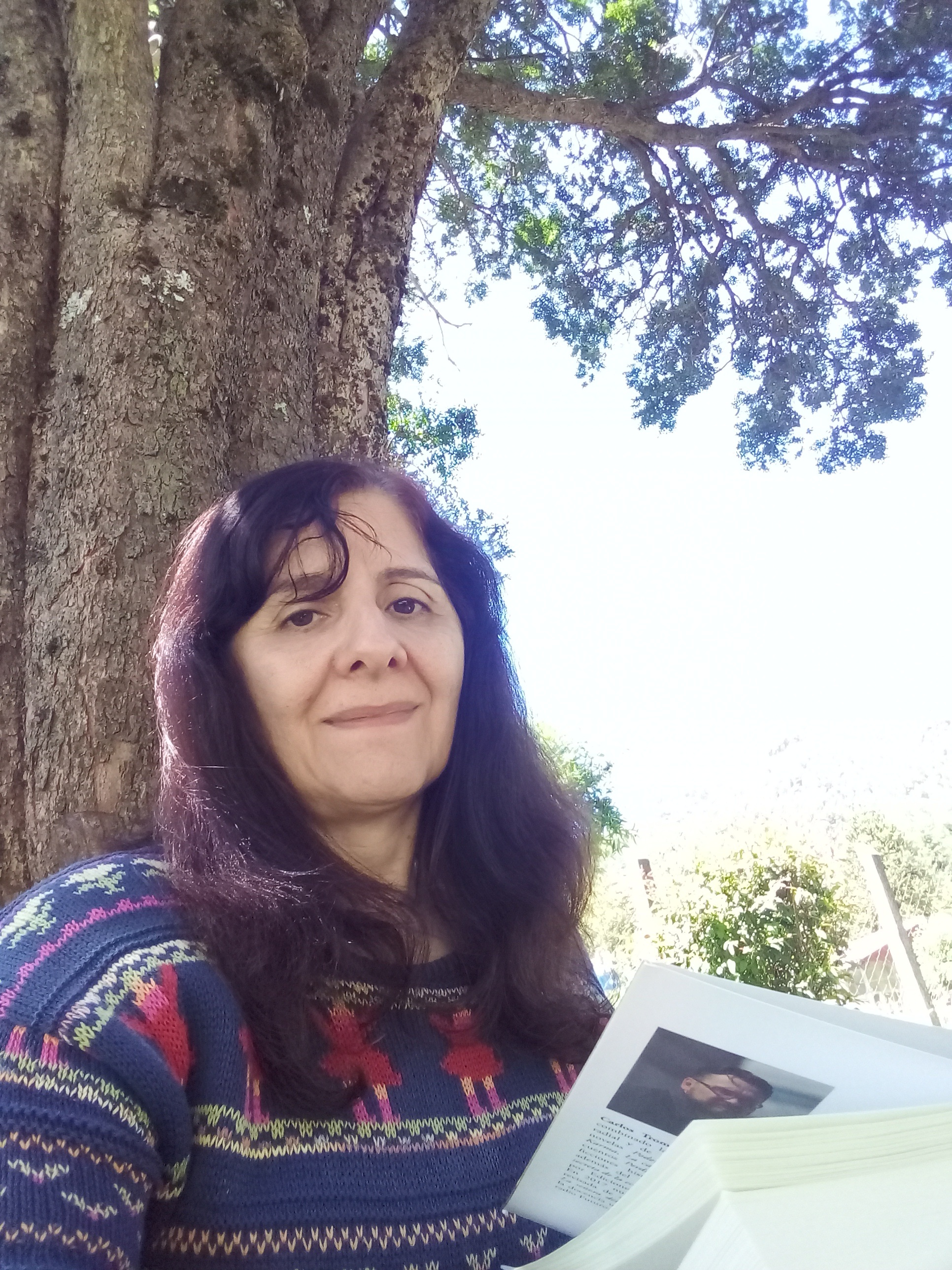 María Eliana Vega